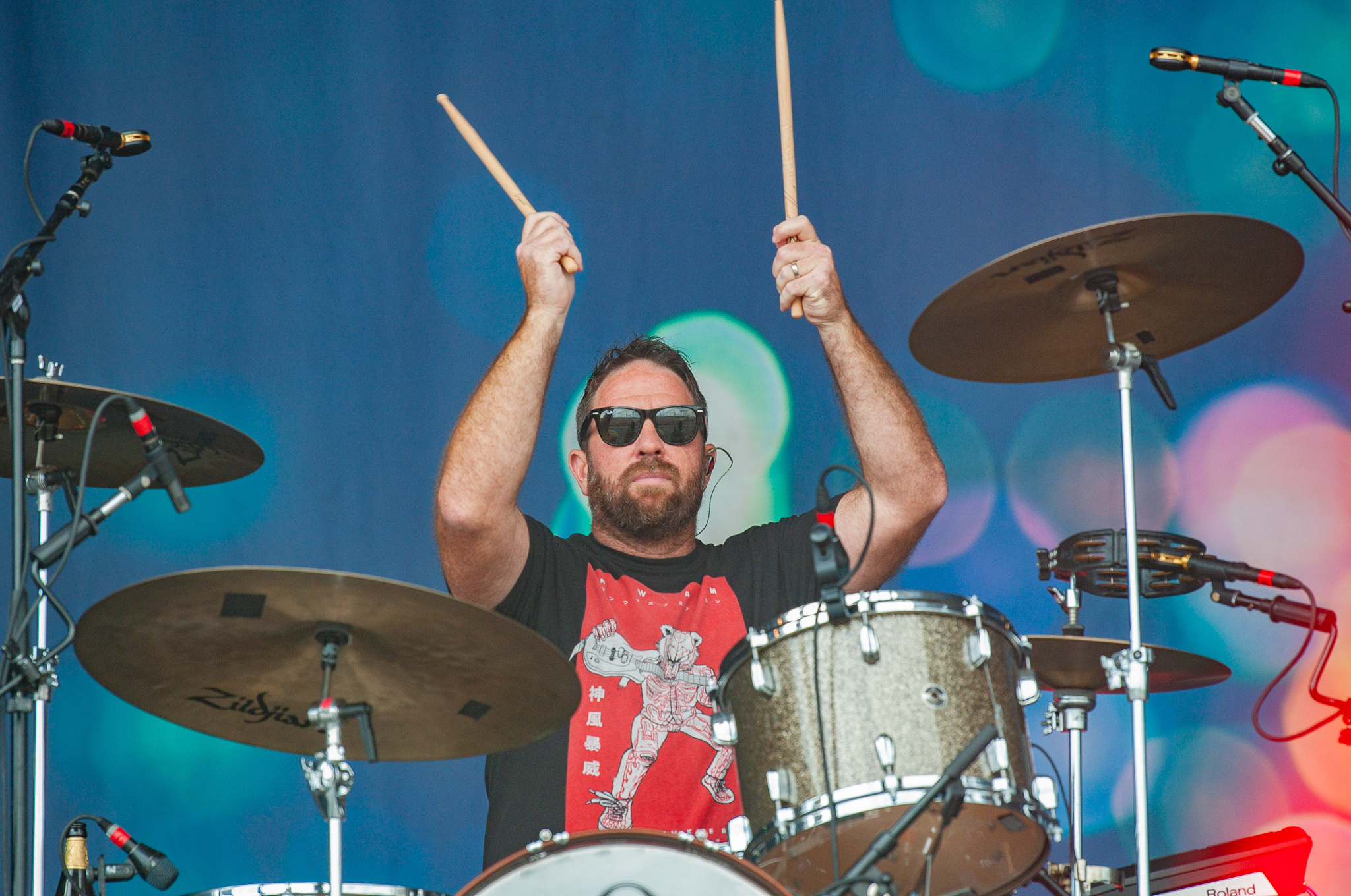 ARGO-Konzerte,Festival,Jimmy Eat World,Konzert,Livekonzert,Livemusik,Musik,RiP,Rock im Park 2018,Zach Lind,Zeppelin Stage